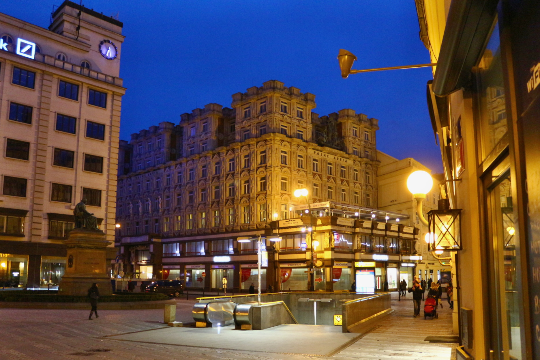 Palác Adria v Praze